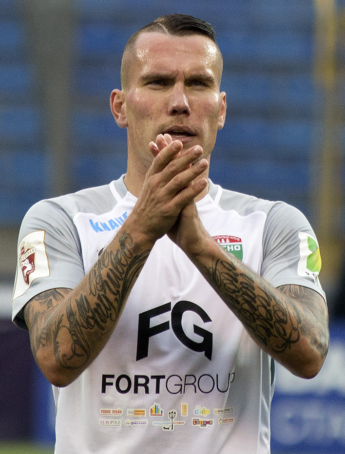 «Тосно» - «Ахмат»